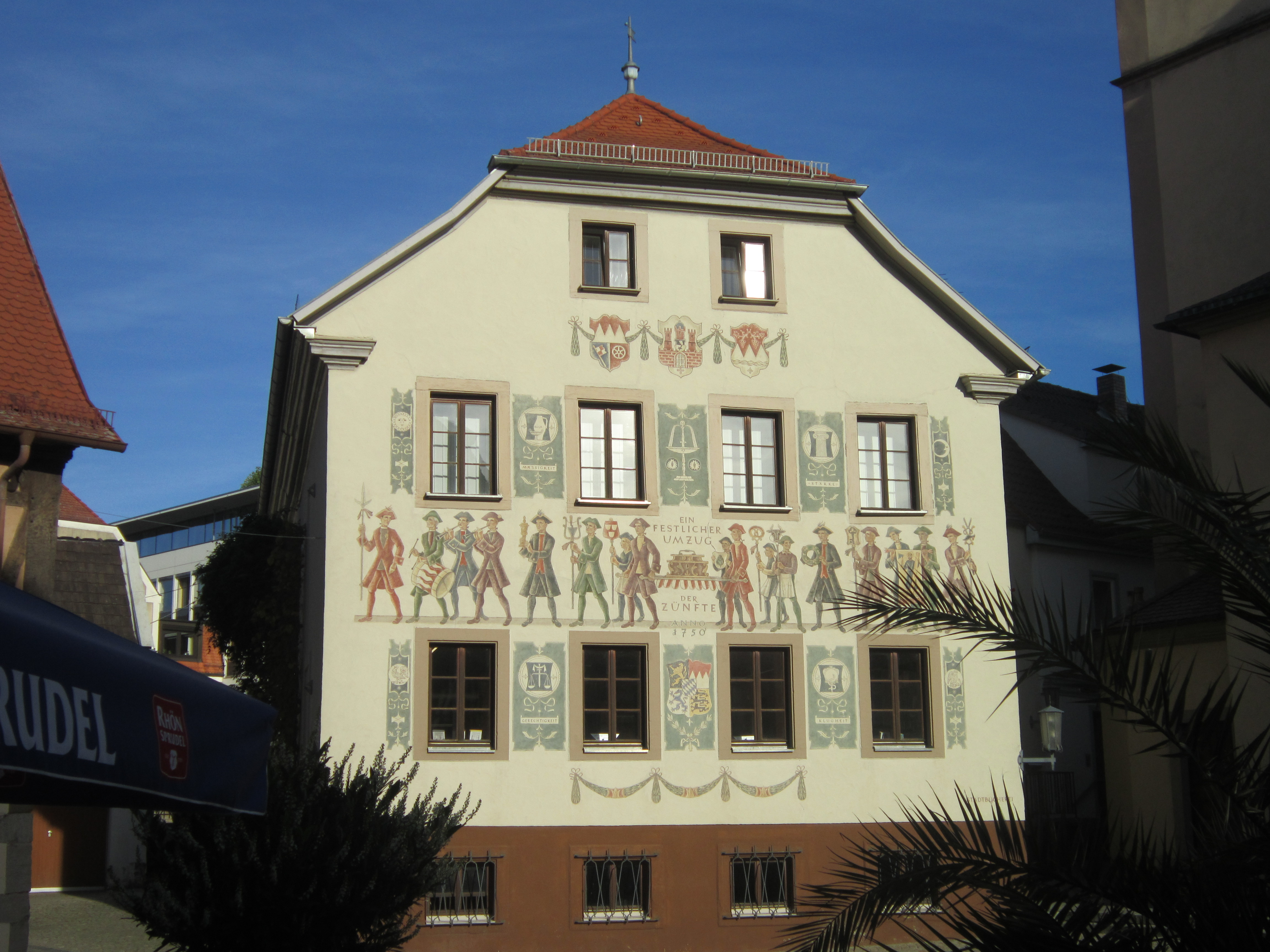 Stadtbibliothek von Bad Kissingen